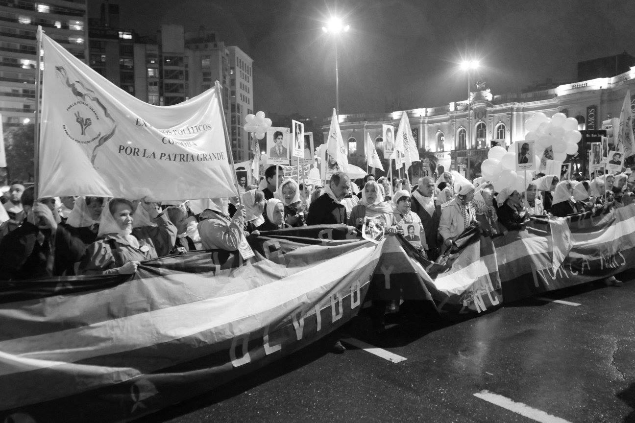 Con las Madres de la Plaza de Mayo, Buenos Aires (2012)